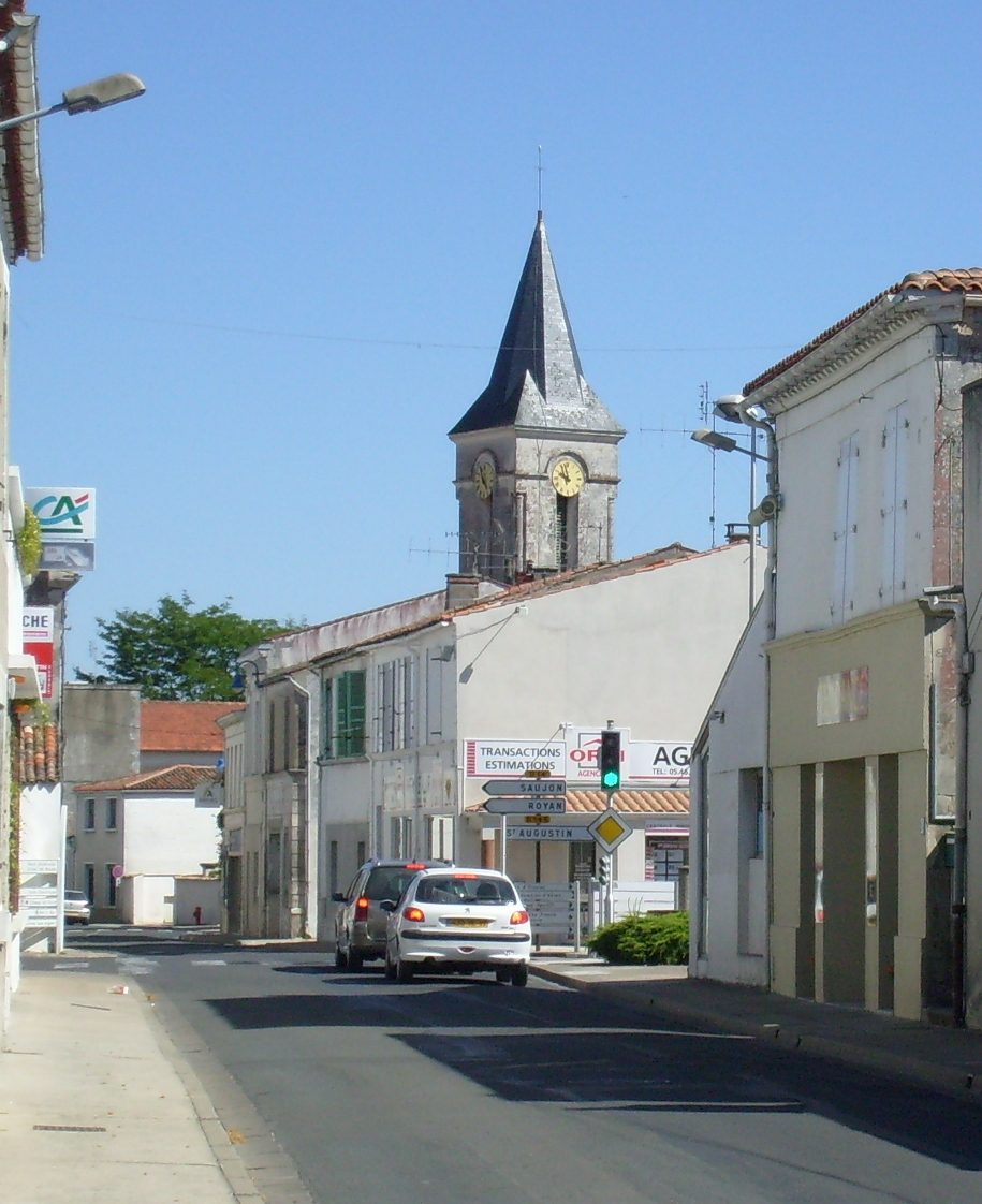 Une vue du centre-ville d'Etaules (avenue Charles-Hervé) à Etaules